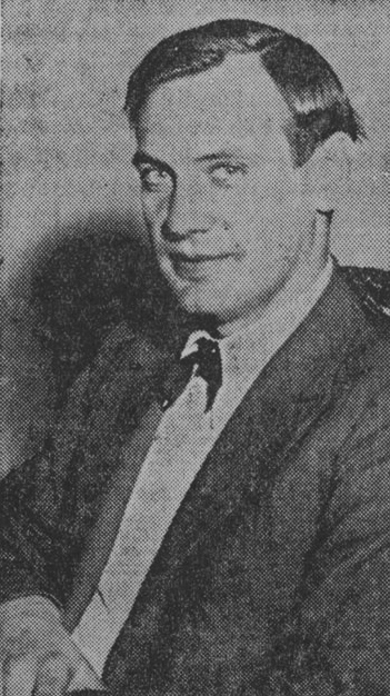 Arkitekten Sven Hesselgren